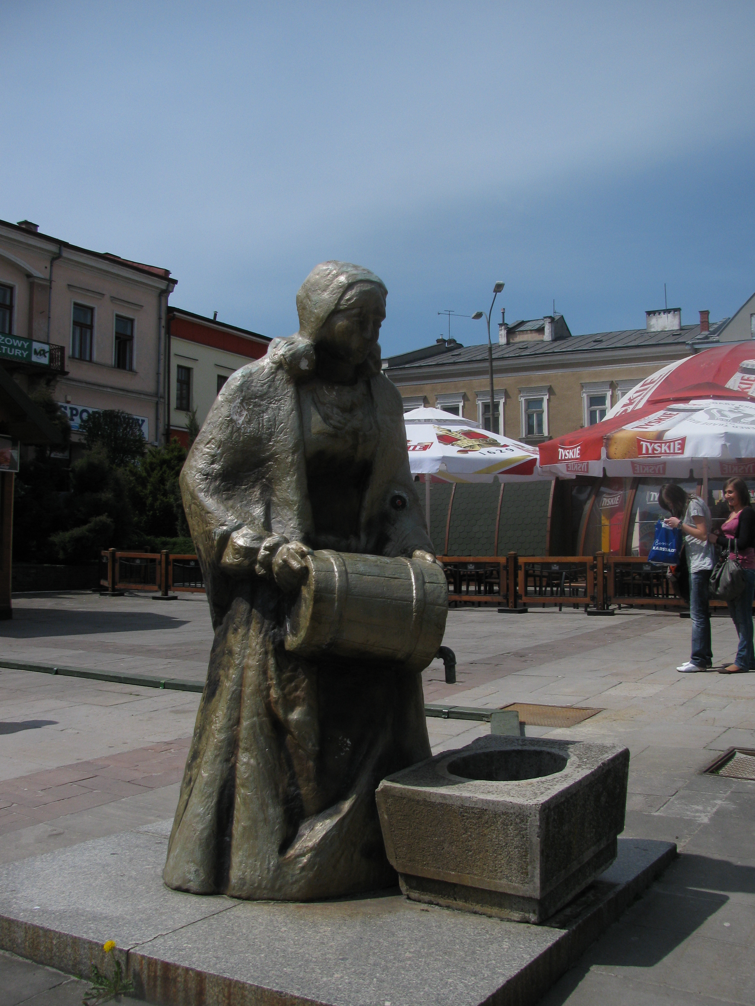 Posąg "Tereski" na gorlickim rynku